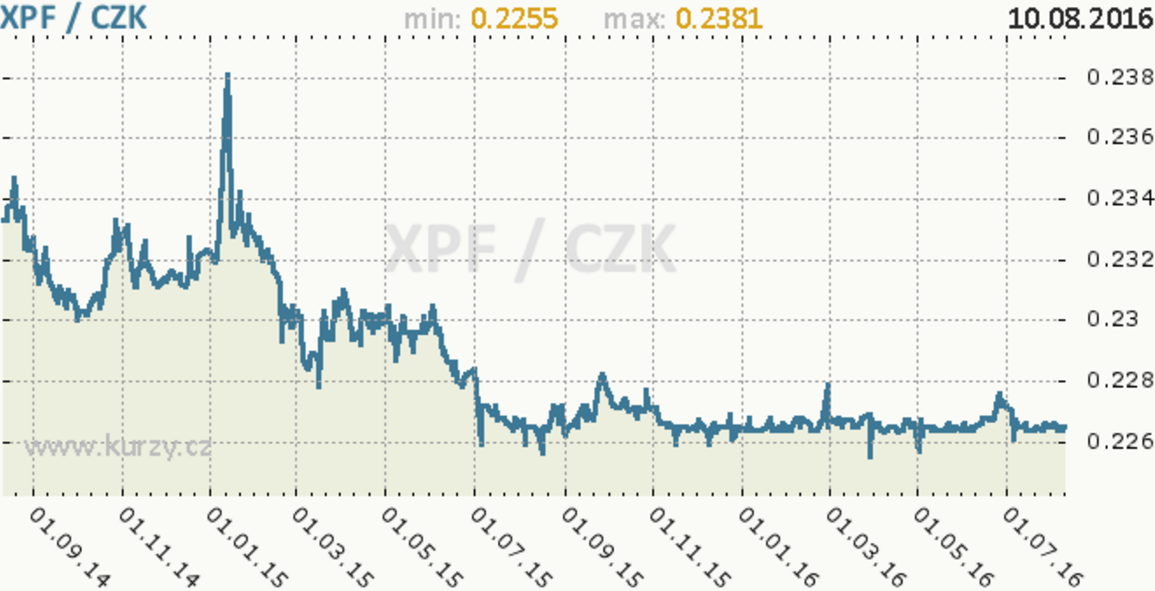 Kurzy měn - XPF polynéský frank CFP